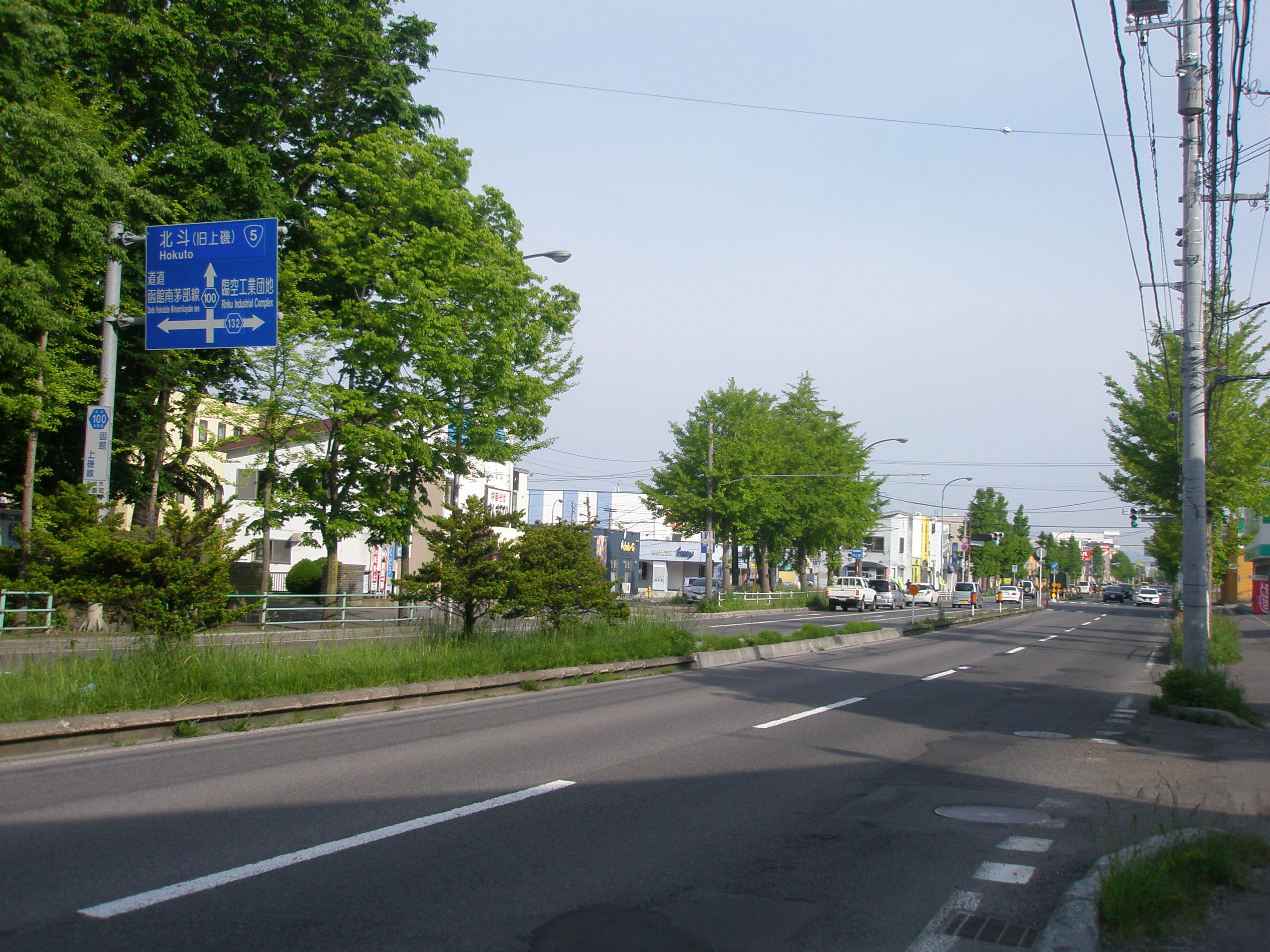 北海道道100号函館上磯線・北海道道1132号函館臨空工業団地線交点-2（起点側から）